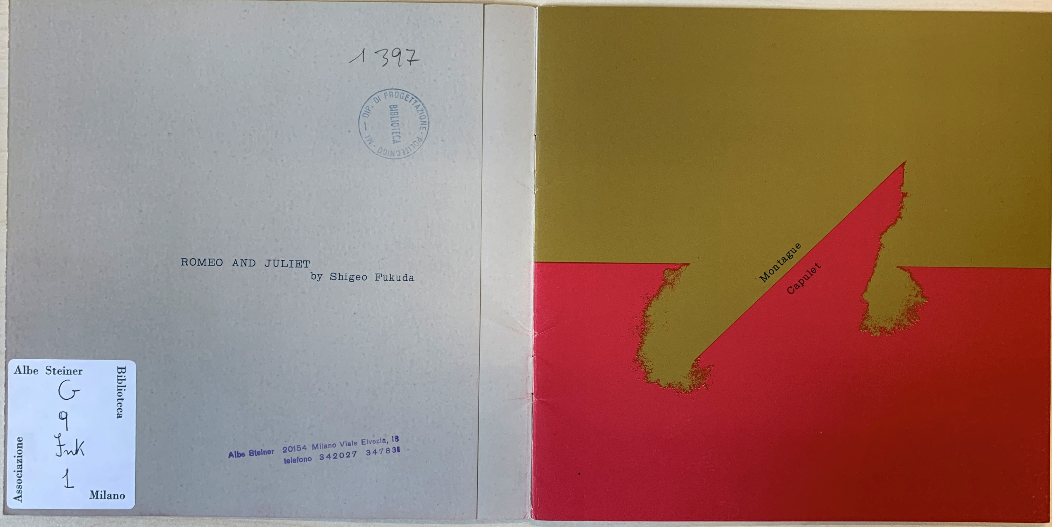 Pagina del libro Romeo and Juliet di Shigeo Fukuda